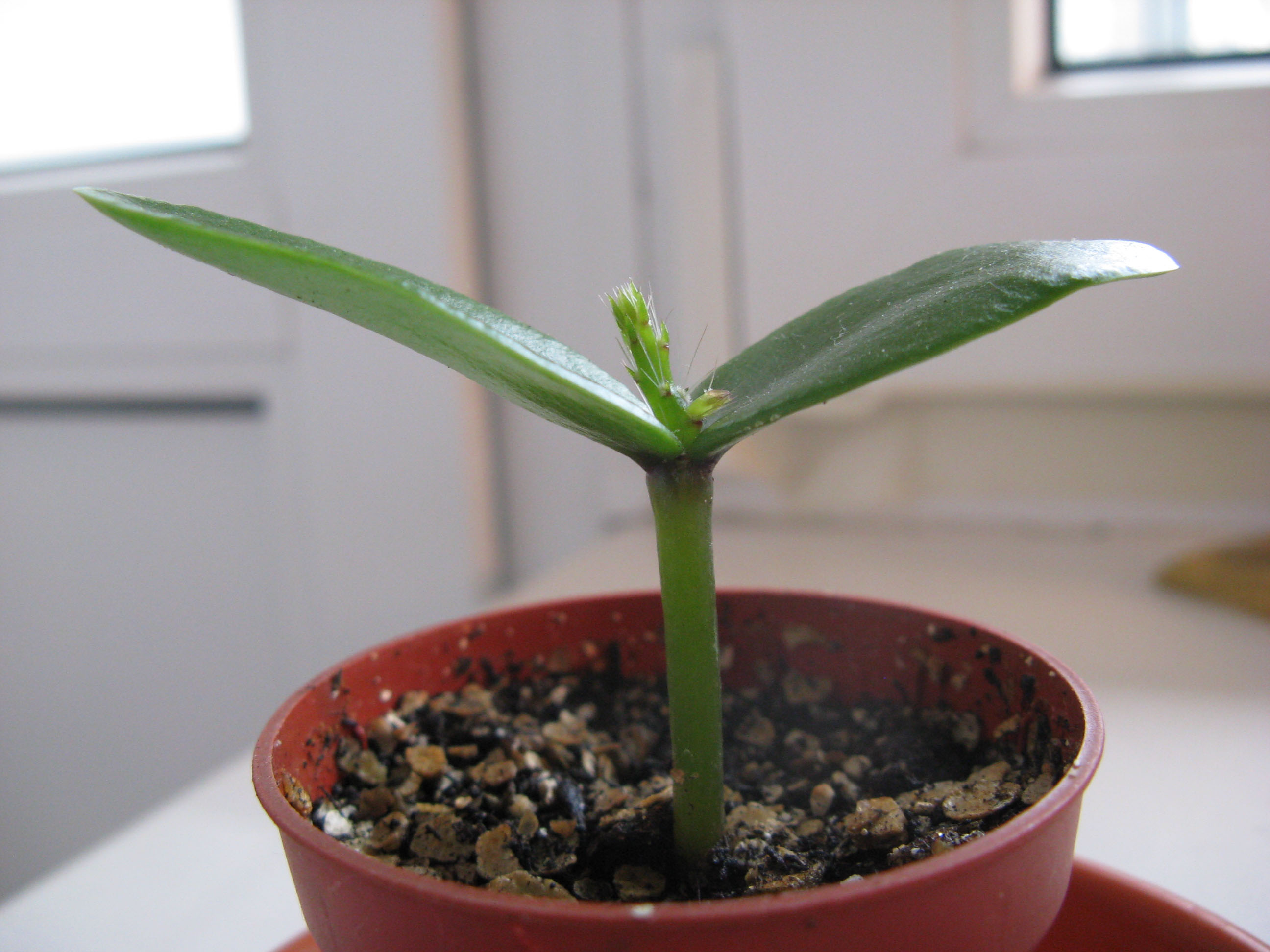 Росток Бразилиопунции.